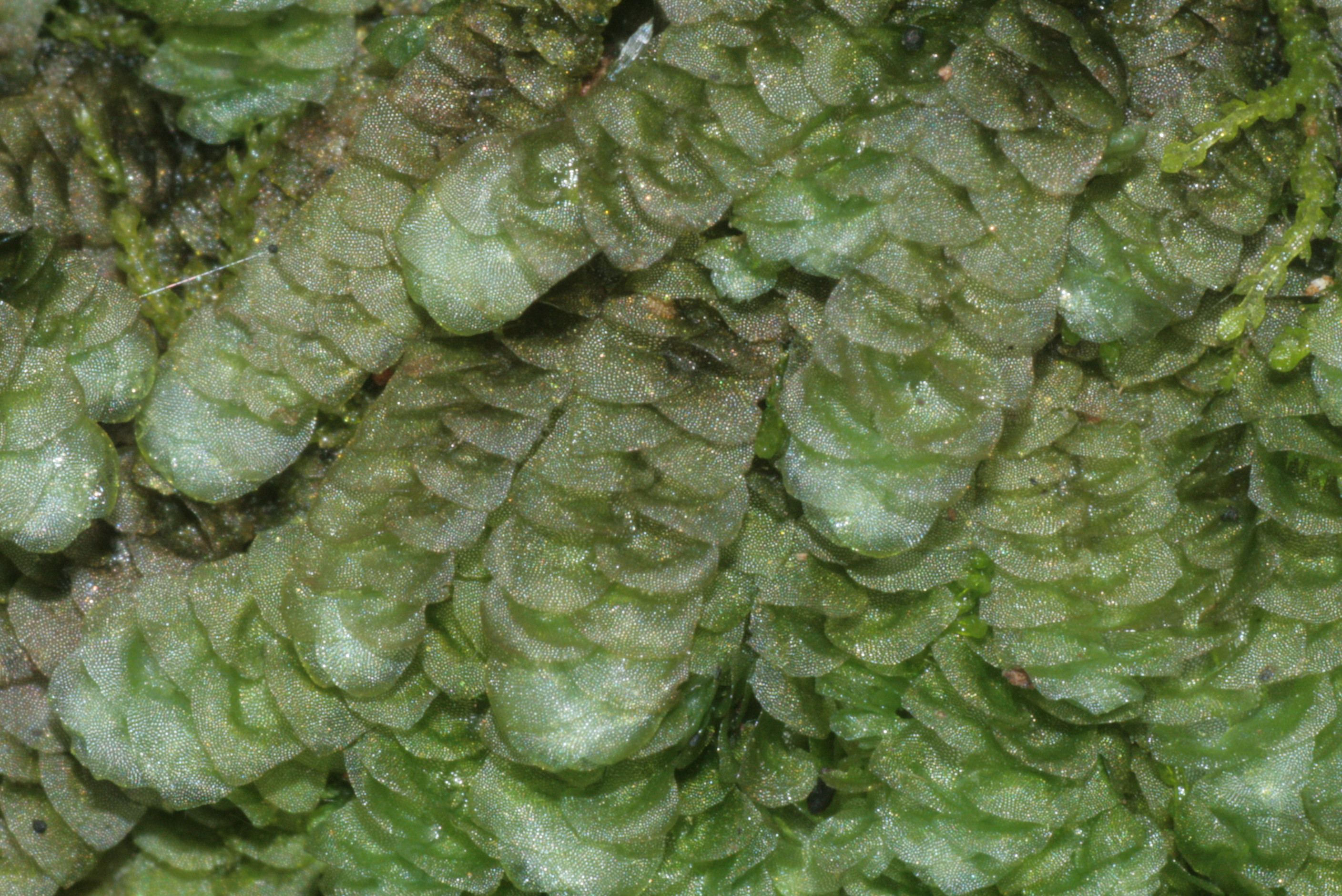 Calypogeia azurea (Bartkelch-Lebermoos) Aufnahmeort: Ybbstal, Niederösterreich, Austria